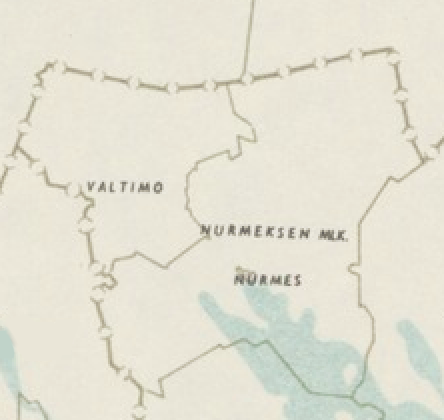 Ylä-Karjalan kunnat vuoden 1960 tilastokartassa.